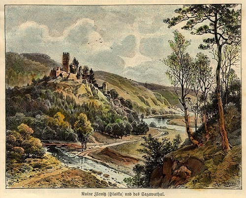 Karel Liebscher, hrad Zlenice, konec 19. století